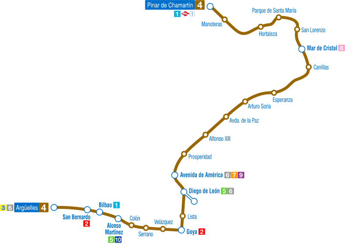 Recorrido de la línea 4 del Metro de Madrid